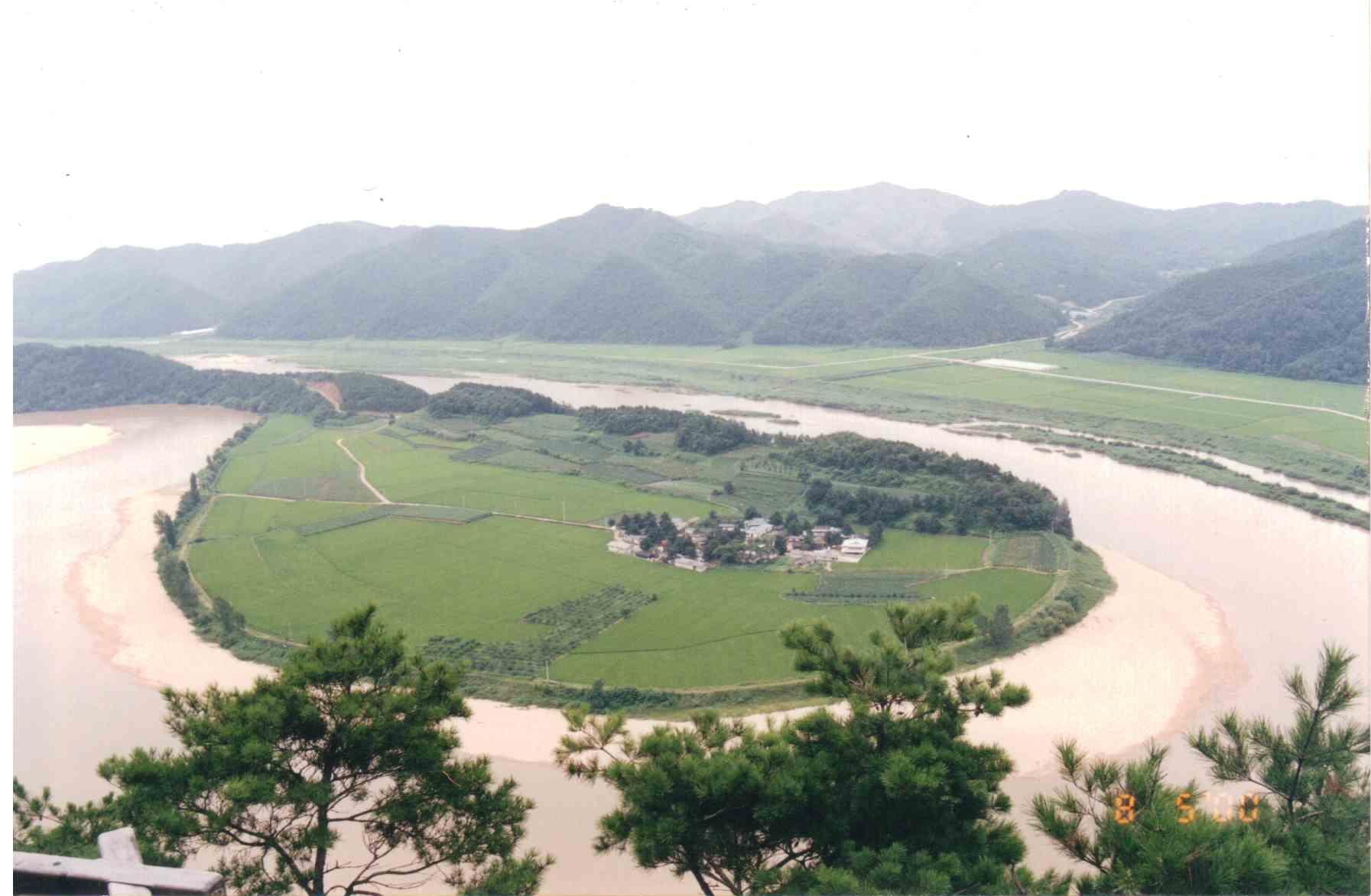 Hoeryongpo at Nasung stream(Nakdong River's branch strem)